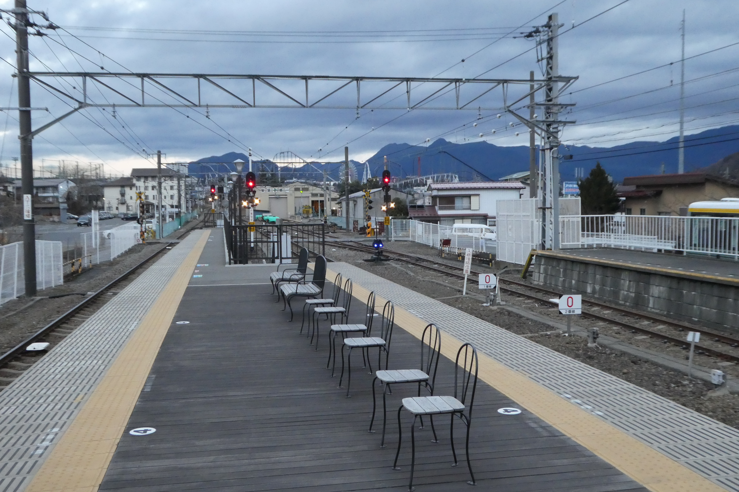 富士急行富士山駅の3番、2番ホーム。